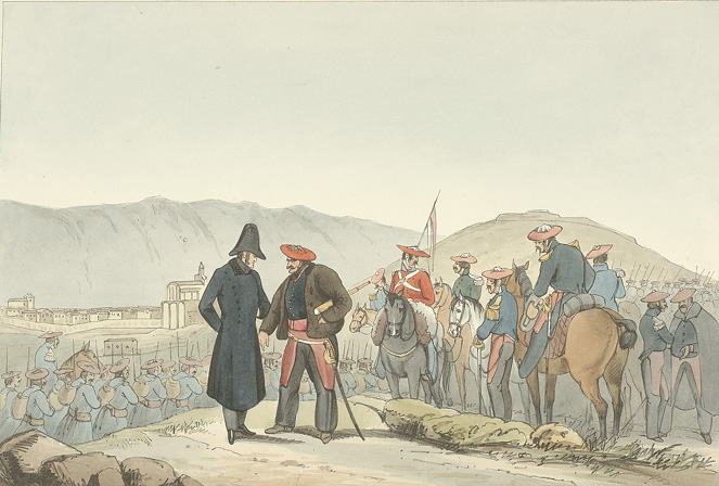 Zumalakarregi, Karlos errege-nahia eta buruzagi karlistak, Aguraindik hurbil, Araban